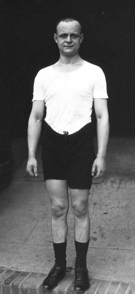 T. Barrelet, Rowing club [14/7/11, dans le bassin de Bercy à Paris, aviron, un rameur senior] : [photographie de presse] / [Agence Rol]